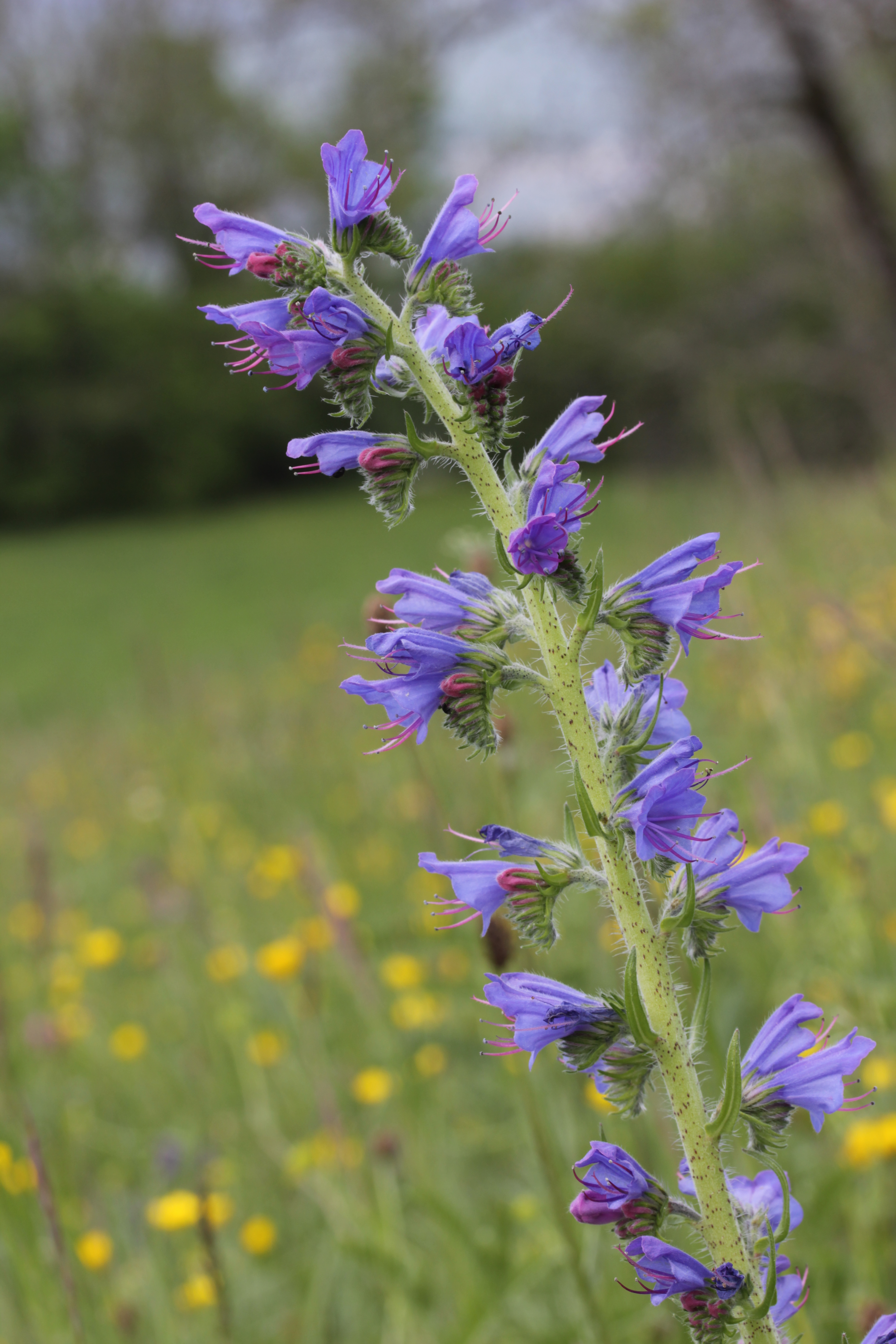 Viper's Bugloss - Echium vulgare